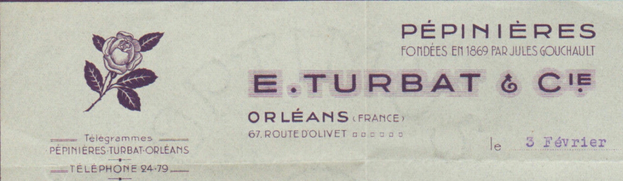 En-tête des pépinières E. Turbat en 1940.